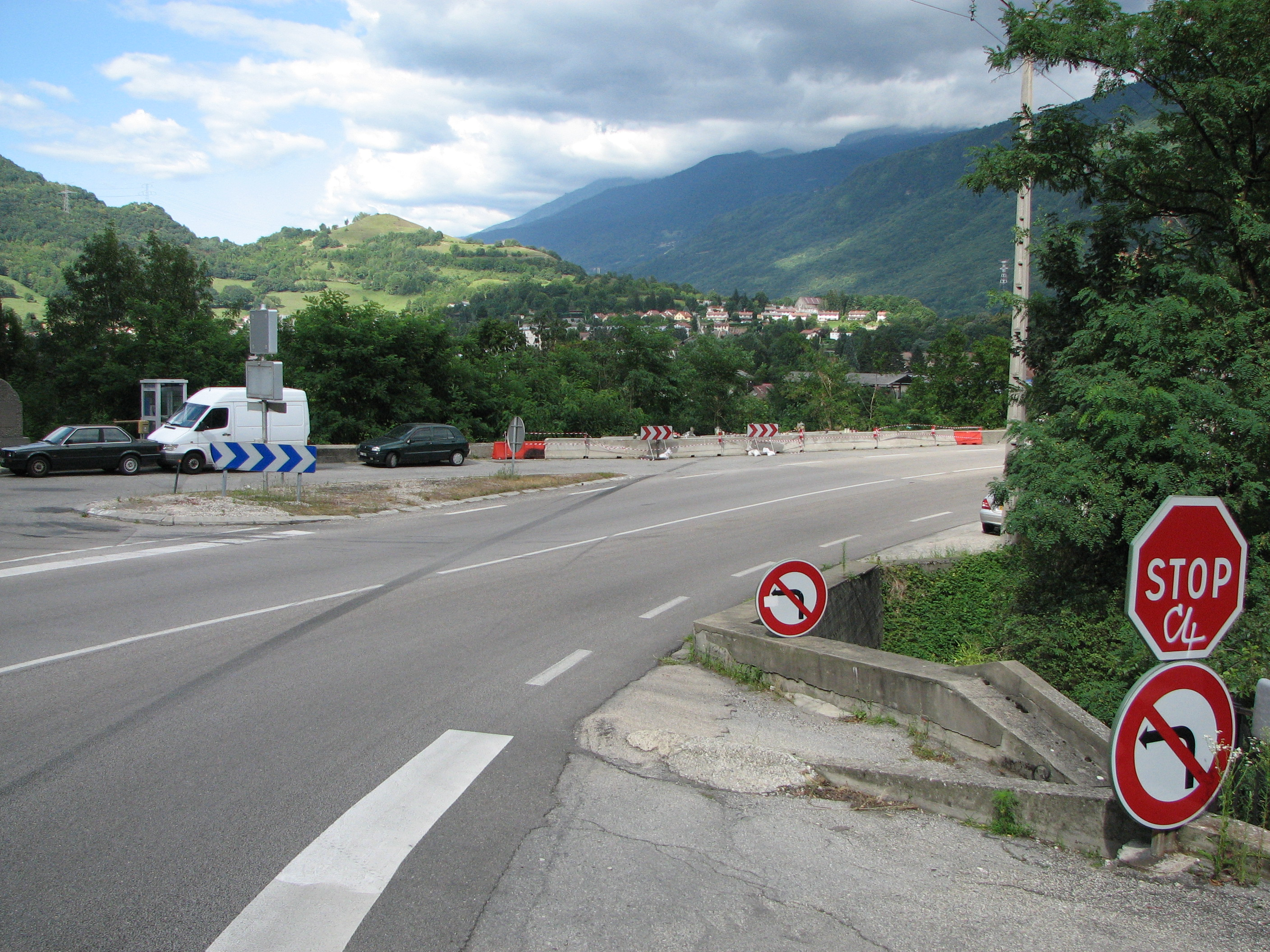 Bas de la descente de Laffrey et lieu des accidents des cars polonais et belge. Les traces de freinage sont celles du bus polonais. Photo prise 8 jours après l'accident.